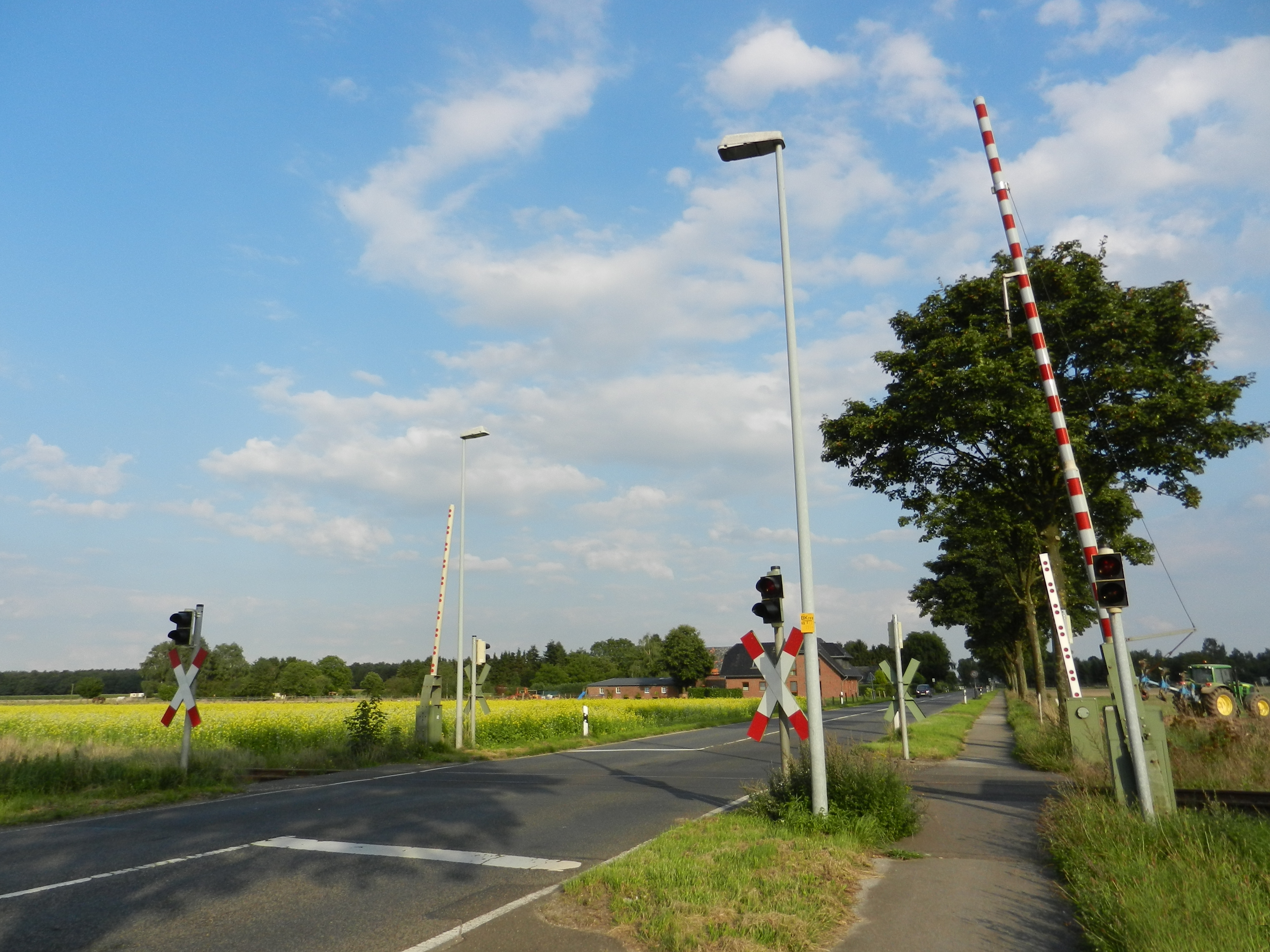 Bahnübergang der Bahnstrecke Wegberg Klinkum–Prüfcenter Wegberg-Wildenrath an der L 367 in Blickrichtung Klinkum